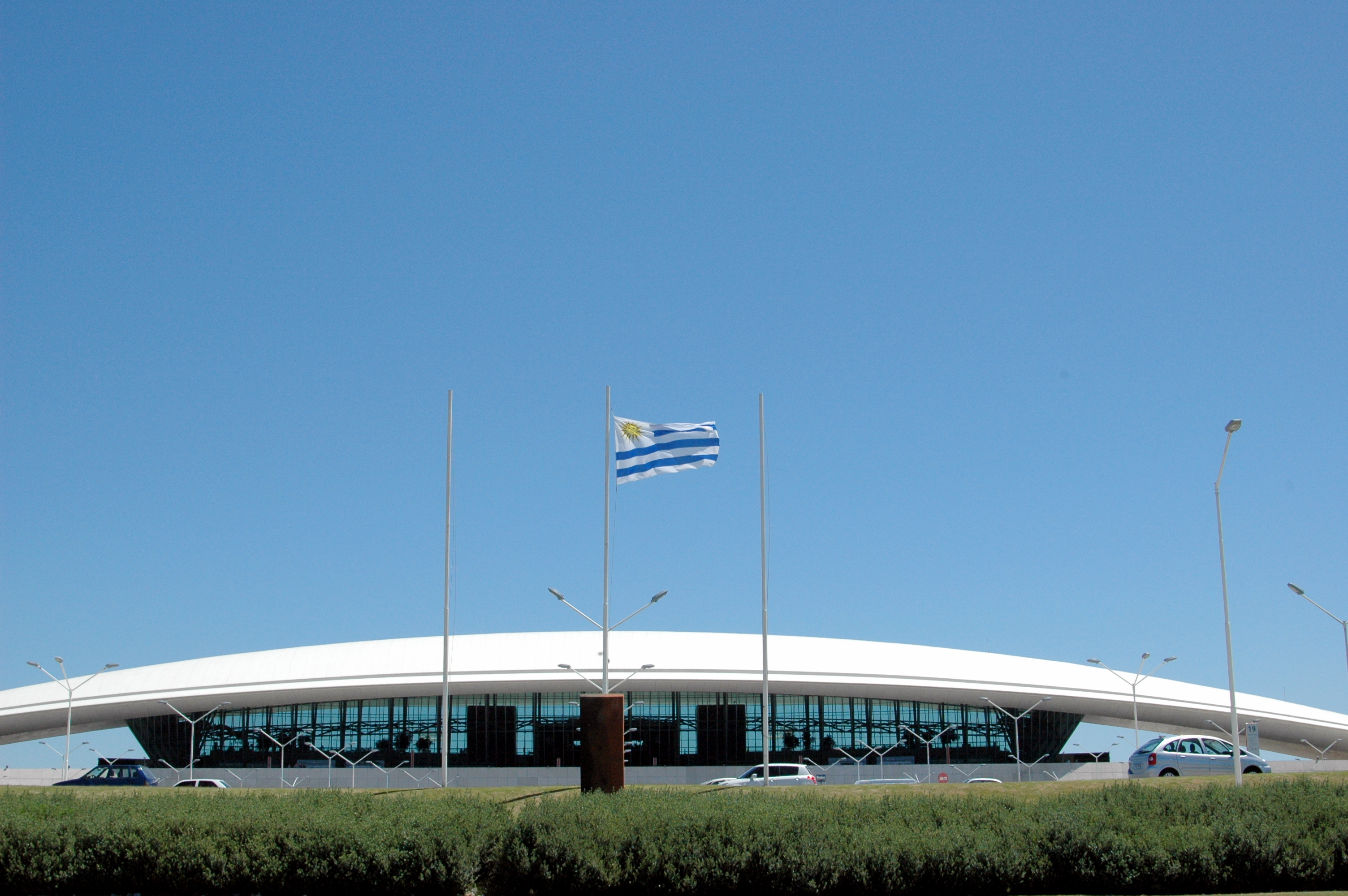 Aeropuerto Internacional de Carrasco